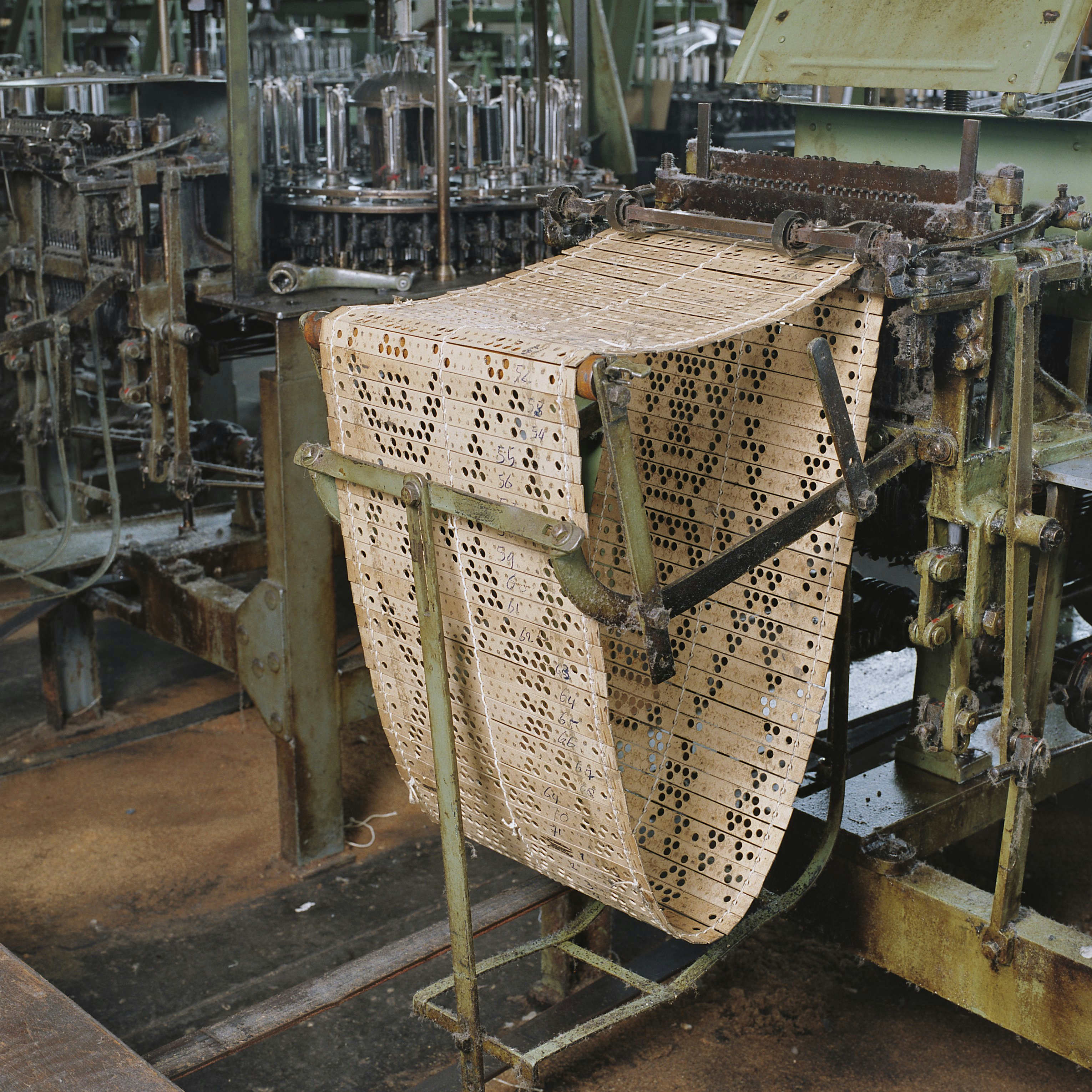 Zuid-Nederlandse Kantfabriek: Interieur, machines in productiehal, ponsband (opmerking: Voorste twee panden zijn van een voormalige sigarenfabriek)